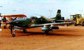 es una imagen de una aeronave Brasilera de paraguay